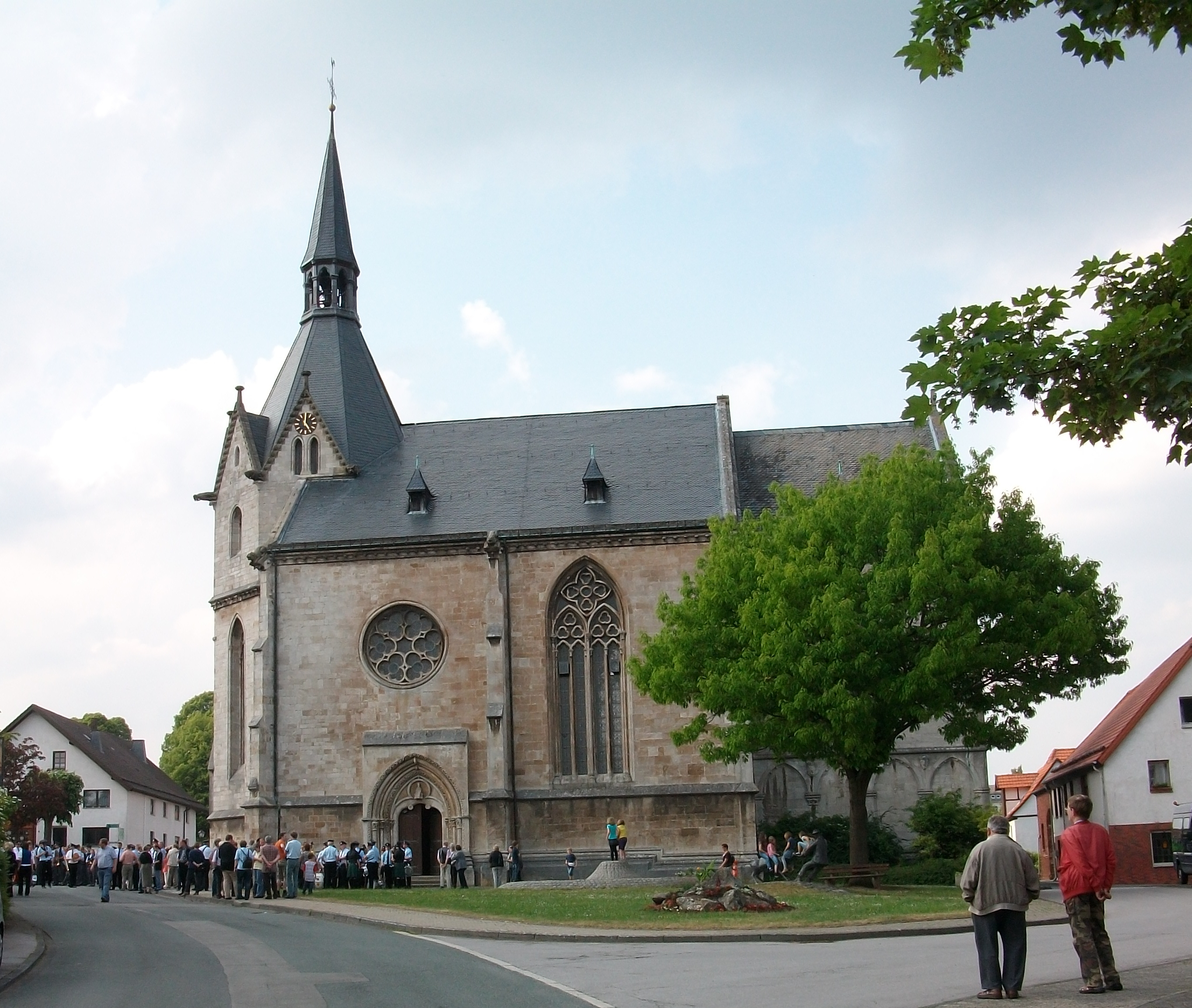 Nikolaikapelle, Obermarsberg, (Germany)